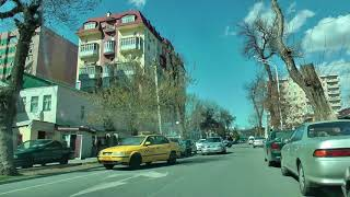 ул. Богоутдинова